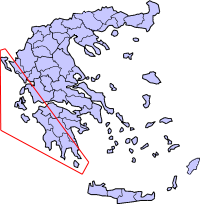 Ионические острова на карте Греции